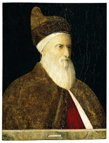 valutazione £ 150.000-200.000. Firmato sul cartellino «[...]BELL[...]». Provenienza: eredi di Lewis, primo visconte di Harcourt. Sotheby